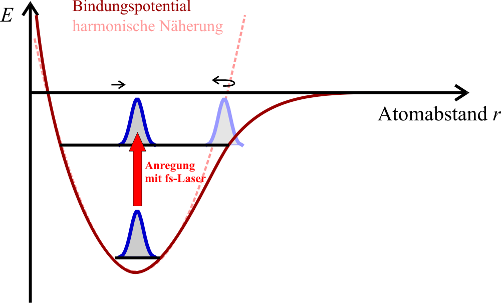 Dynamik eines Wellenpakets im H2-Molekül (Schwingung!) vermessen